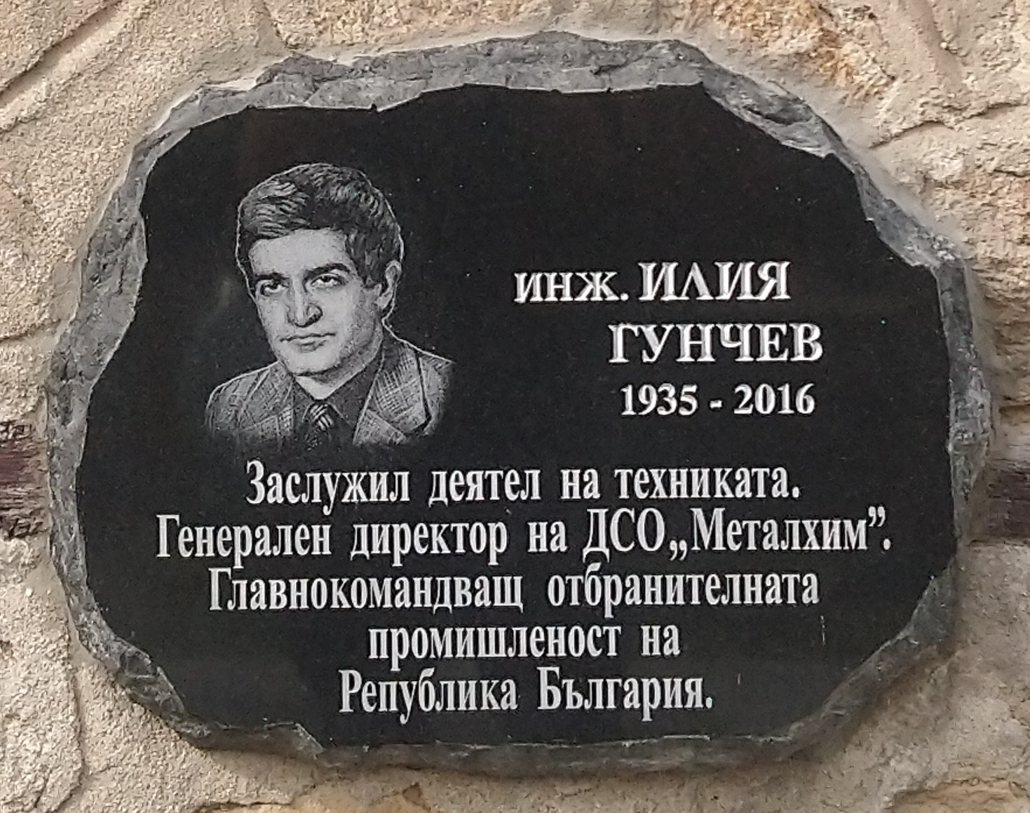 инж. Илия Гунчев (1935-2016) - плоча в Исторически музей Панагюрище - Надпис: Заслужил деятел на техниката. Генерален директор на ДСО "Металхим". Главнокомандващ отбранителната промишленост на Република България